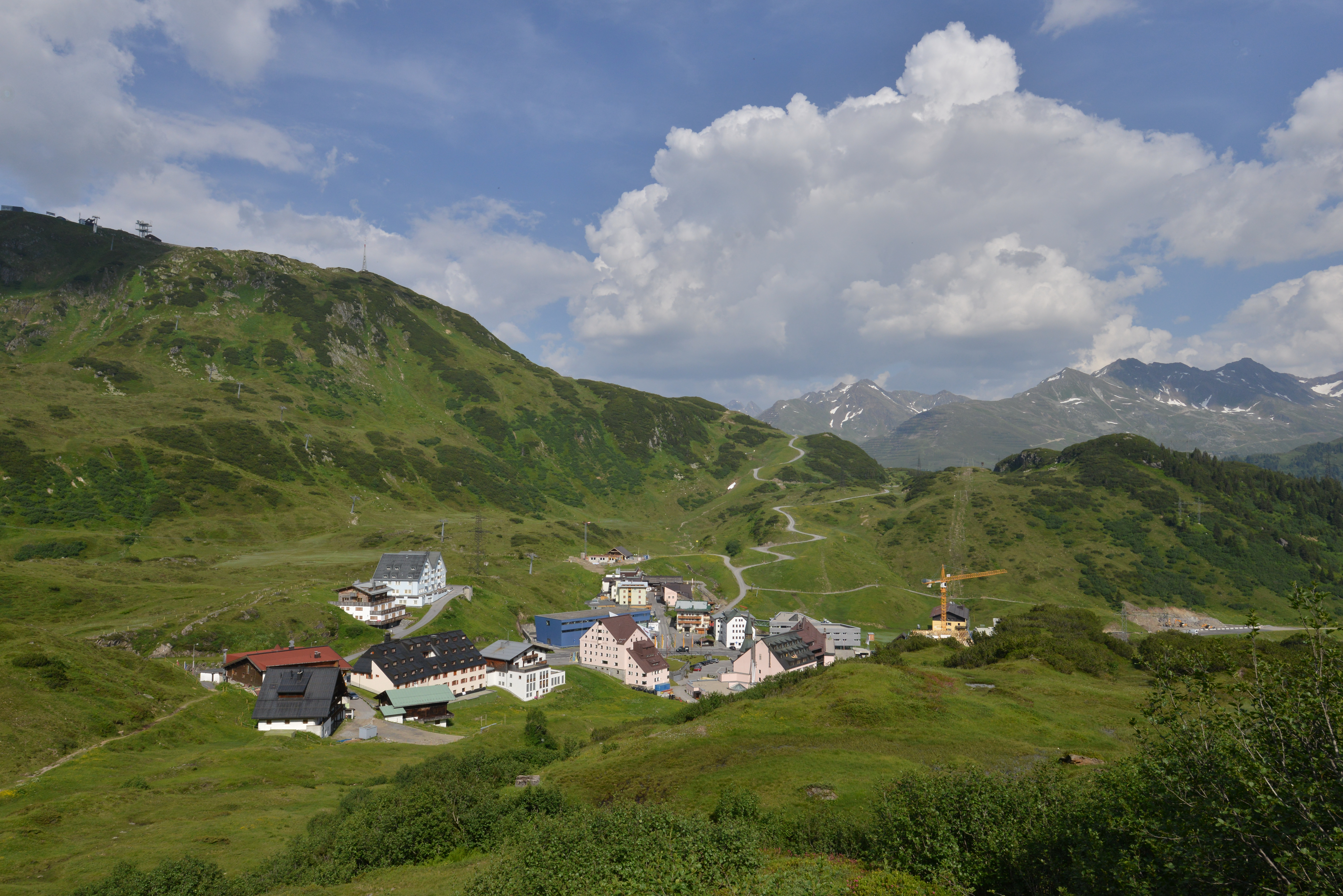 St. Christoph am Arlberg im Sommer 2015.